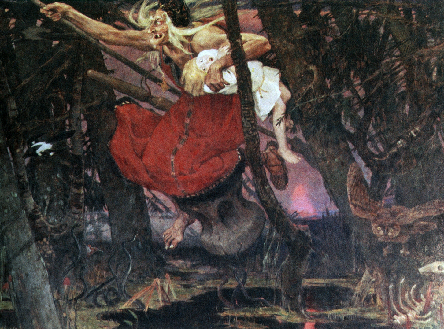 Баба Яга